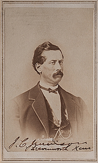 Carte de Visite of Charles R. Jennison